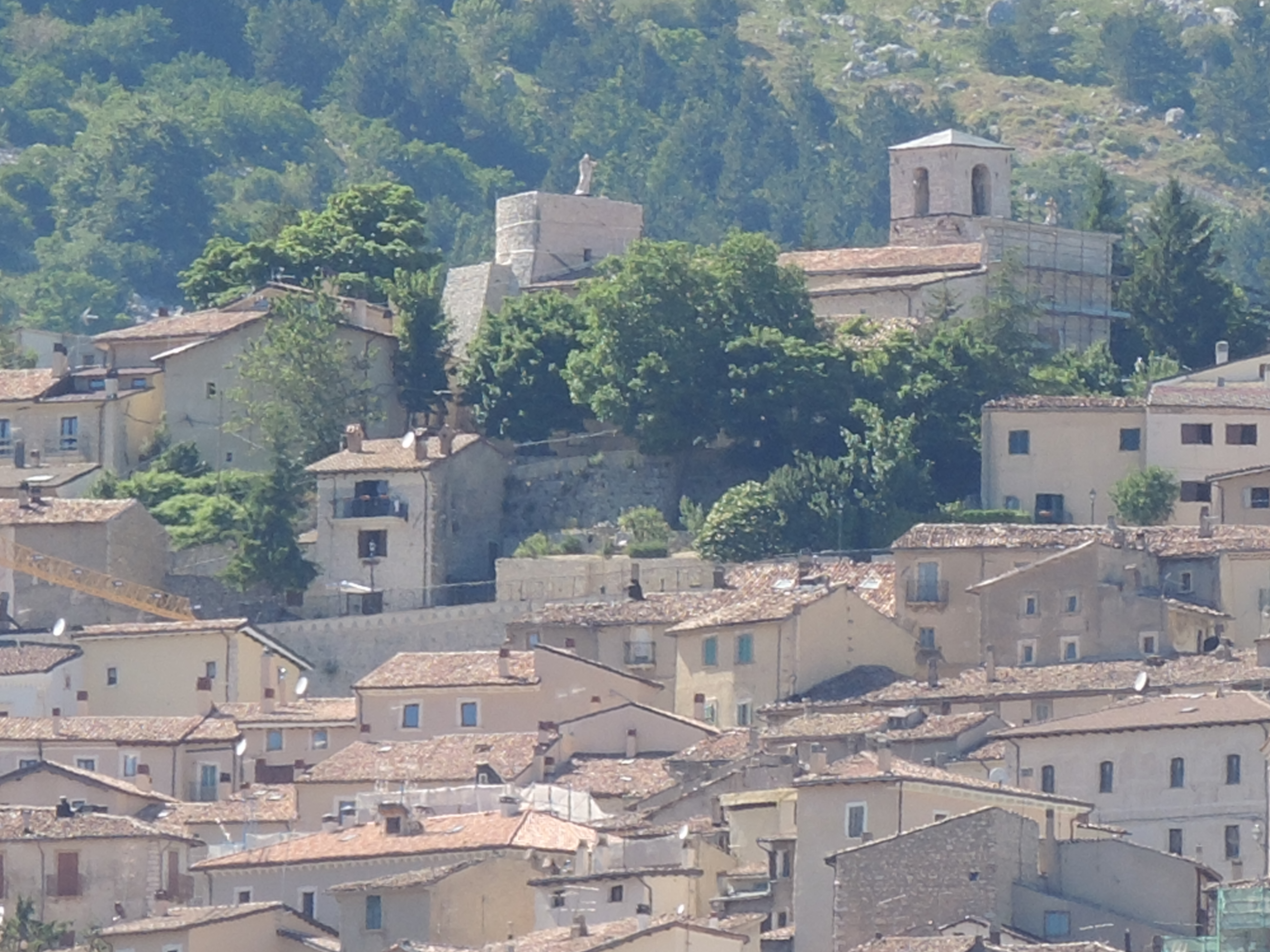 Rocca di Cambio (AQ): Collegiata di San Pietro